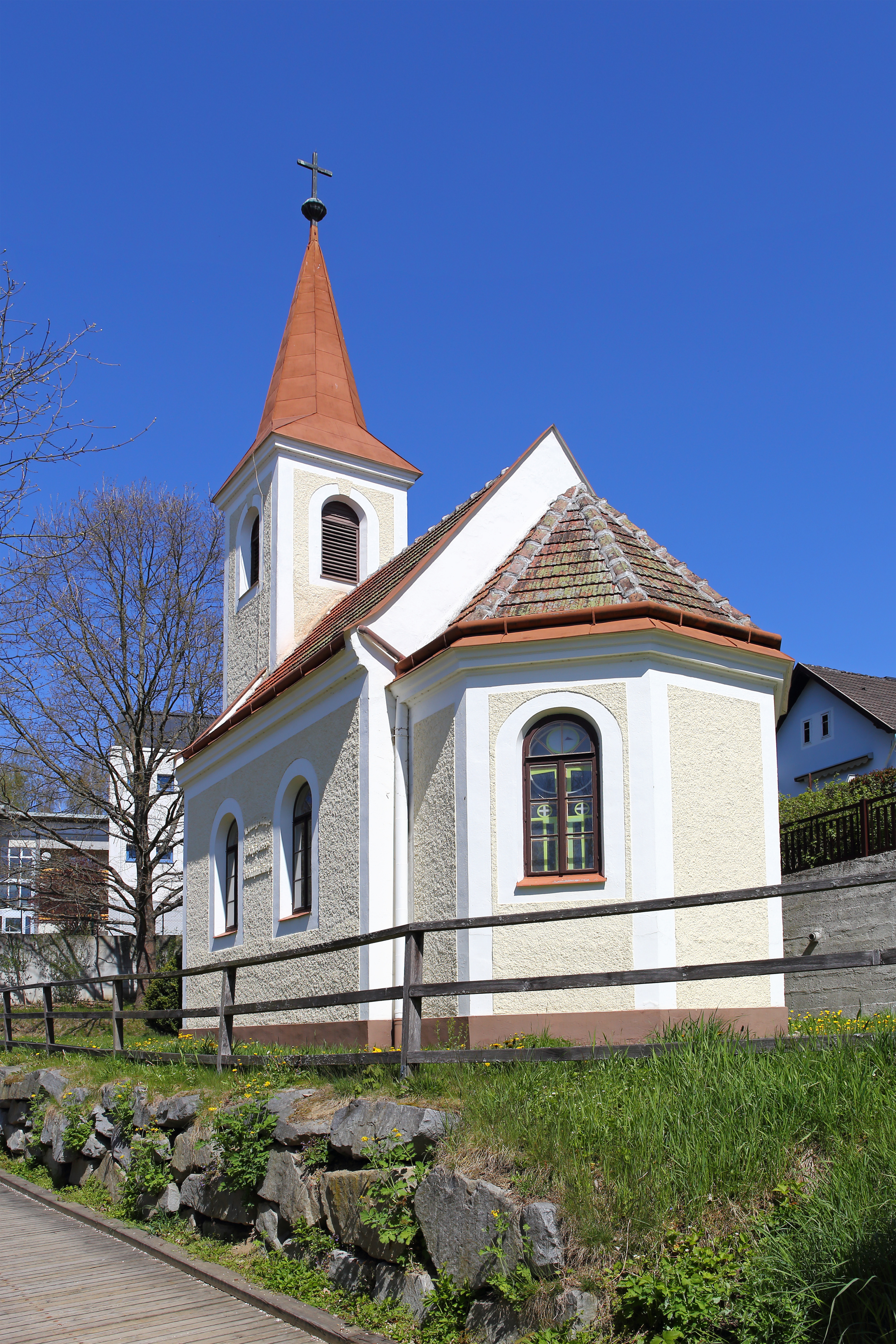 Die Evangelische Kirche in Zwettl wurde 1904 errichtet.